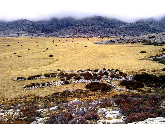 Andartis tis Irinis - Partisan des Friedens von Karina Raeck, Nida Crete